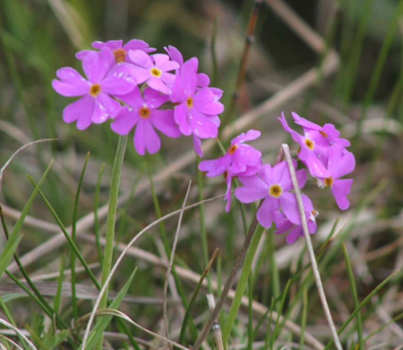 Primula_farinosa (Primula farinosa) Località: Val Belluno, 350 m s.l.m.